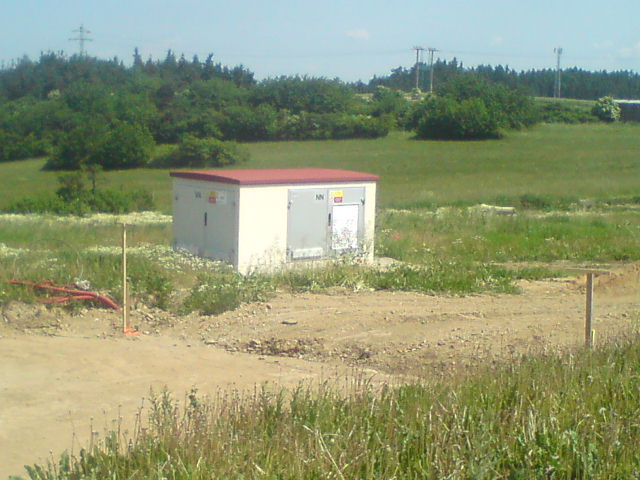 Transformátor